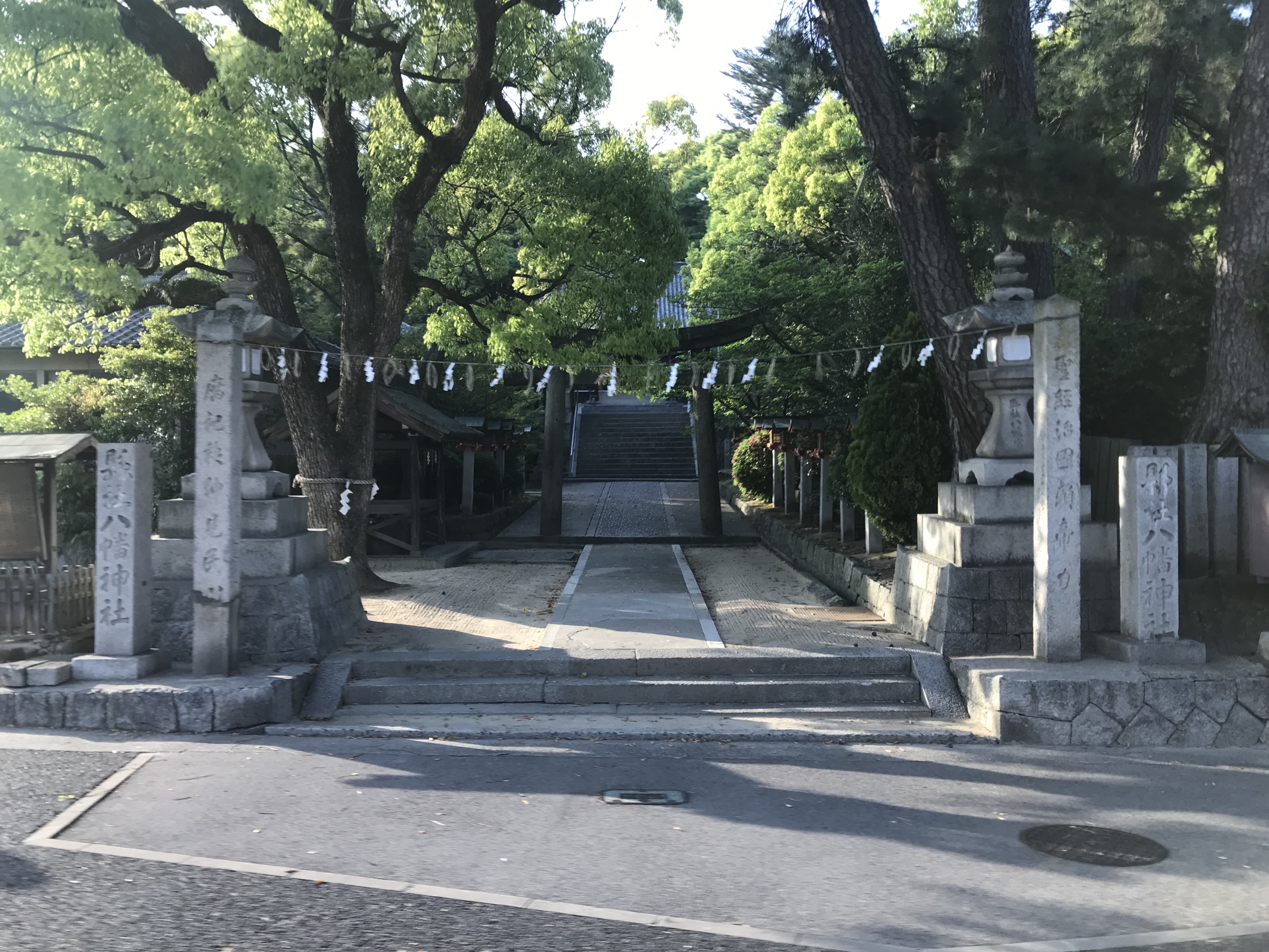 バス車内より望む向島の亀森八幡神社